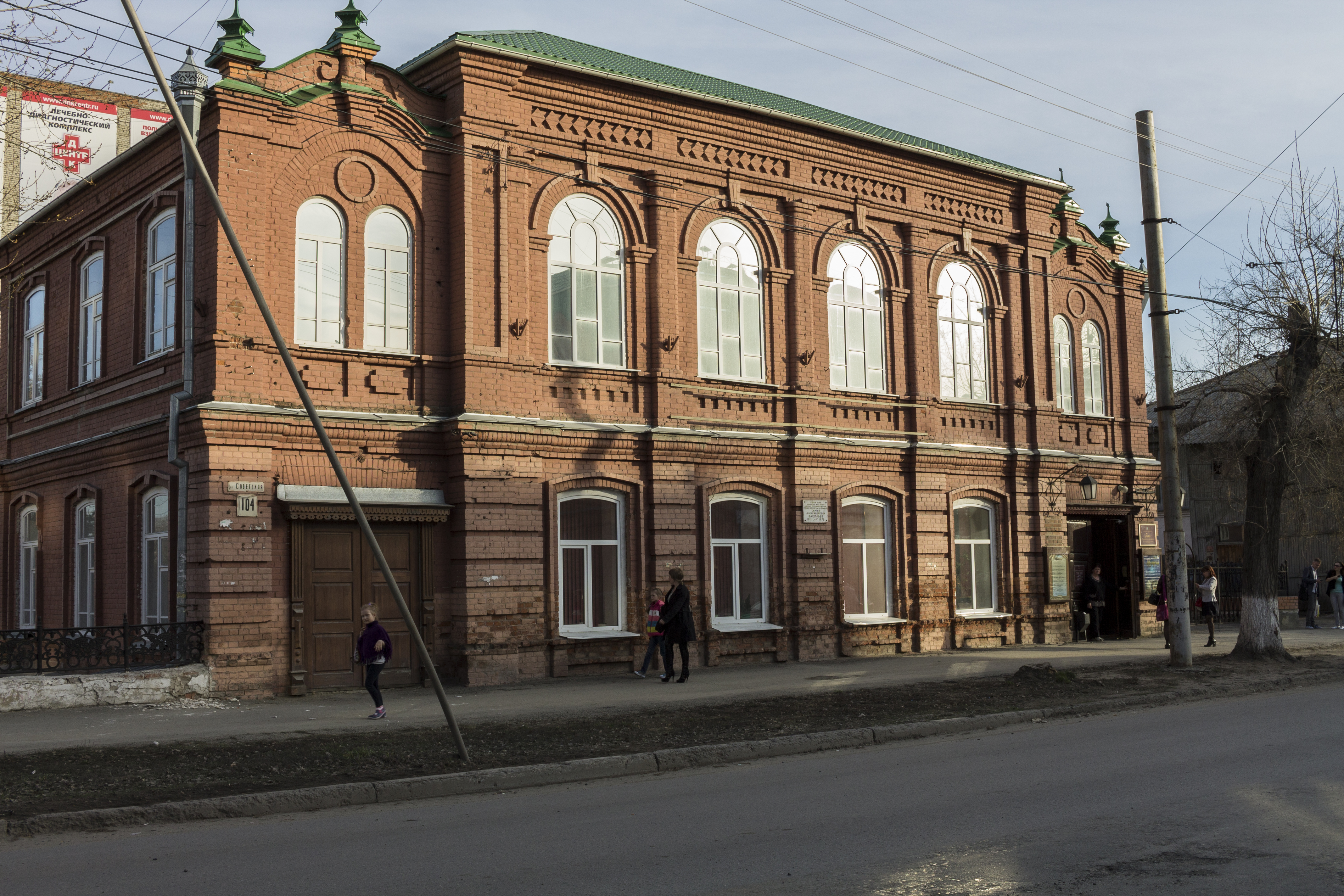 Доходный дом Васильевых, в семье которых родился известный поэт С. Васильев: улица Советская, 104, Курган, Курганская область